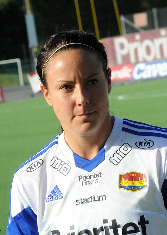 Carola Söberg (Tyresö FF)